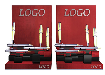 PLV: présentoir concessionnaire pour stylos, montres, ou briquets, avec des plots modulables (création de Christine CLEMENT)